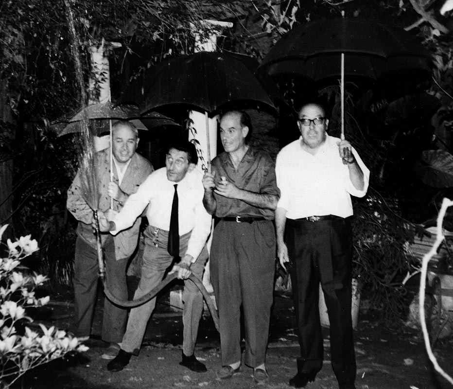 Facècia del grup de "Mestres paperinaires"